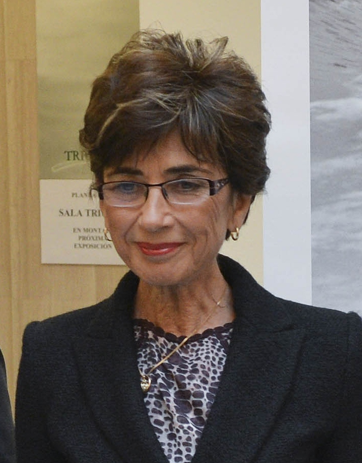 15.01.16 Exp. SARAMAGO.Sevilla 2